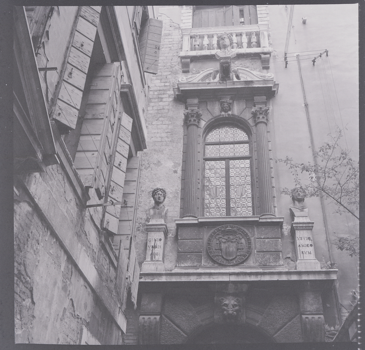 Servizio fotografico : Venezia, 1970 / Paolo Monti. - Buste: 34, Fototipi: 34 : Negativo b/n, gelatina bromuro d'argento/ pellicola ; 6x6. - ((Serie costituita da 34 buste di negativi identificati con i nn.: 5832, 5833, 5834, 5835, 5836, 5837, 5838, 5839, 5840, 5841, 5842, 5843, 5844, 5845, 5846, 5847, 5848, 5849, 5850, 5851, 5852, 5853, 5854, 5855, 5856, 5857, 5858, 5859, 5860, 5861, 5862, 5863, 5864, 5865, e tenute insieme da una graffetta. - Sulla busta identificata con il n. 5832 iscrizione didascalica manoscritta a pennarello.